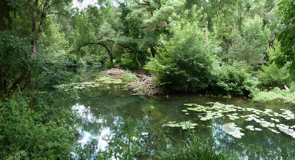 L'Issole au niveau du pont de la D13 et à proximité du Trou des Fées . 83340 Cabasse . France